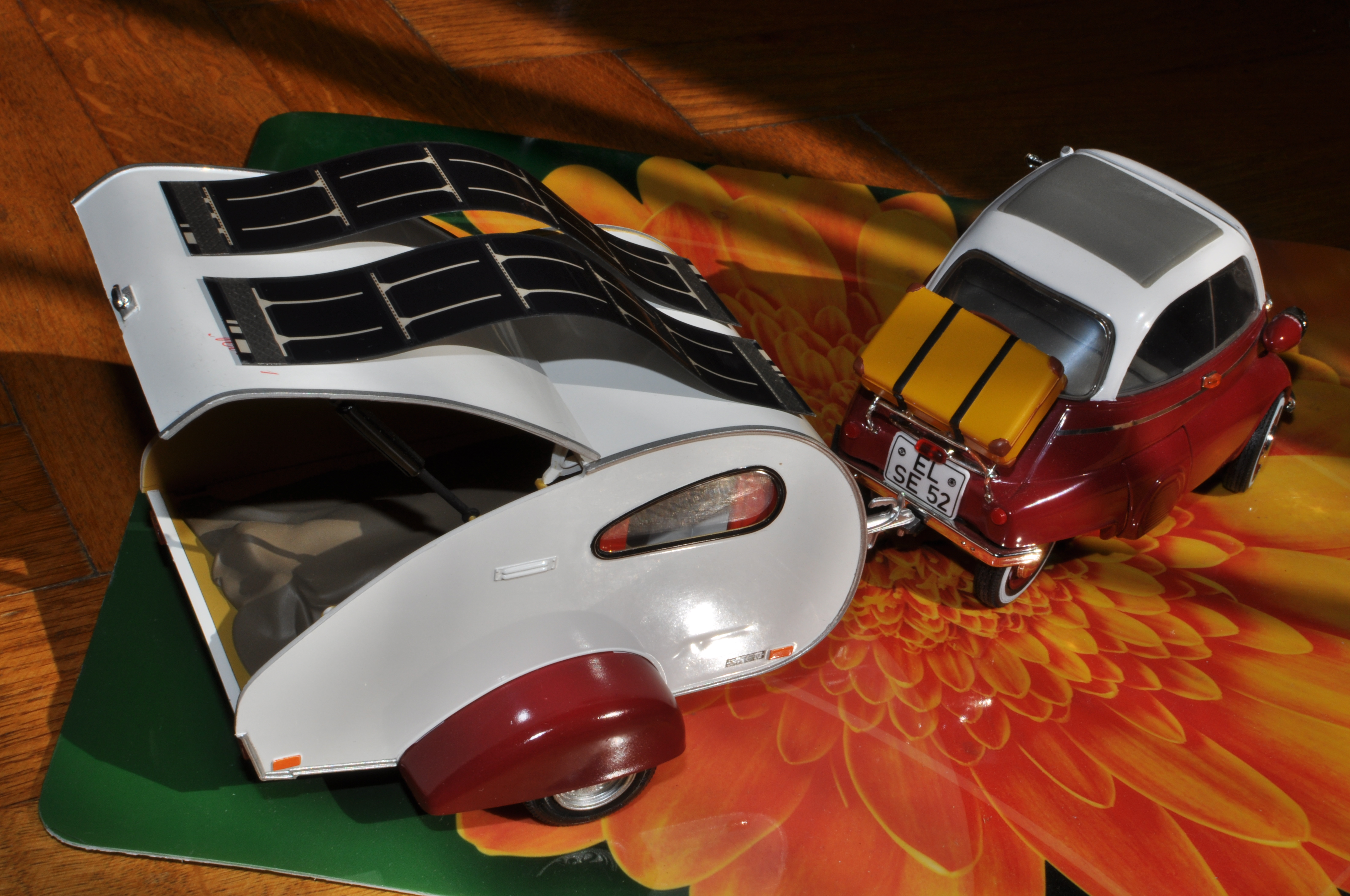 Flexible Solarzelle auf Modellauto 1:18.